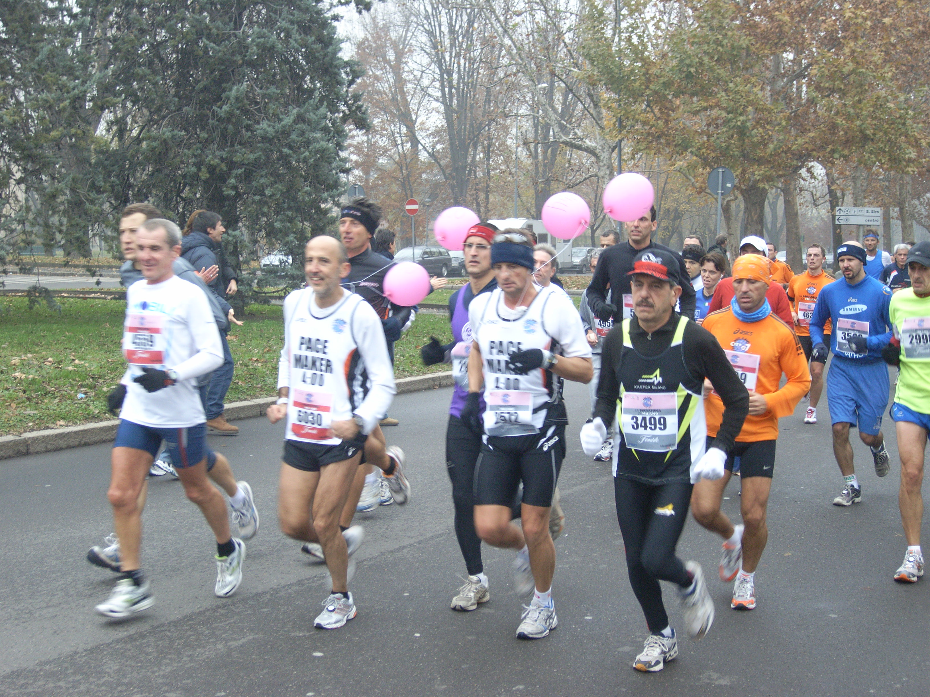 Maratona di Milano Milano City Marathon 2007